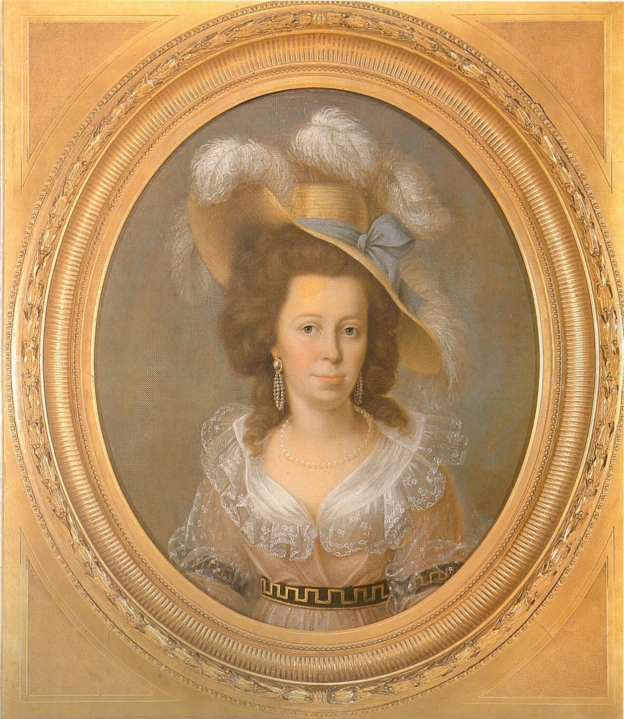 Herzogin Franziska, Reichsgräfin von Hohenheim (1748-1811), zweite Gemahlin Herzog Carl Eugens. Schloss Ludwigsburg, Höfische Kunst des Barock. S. 252